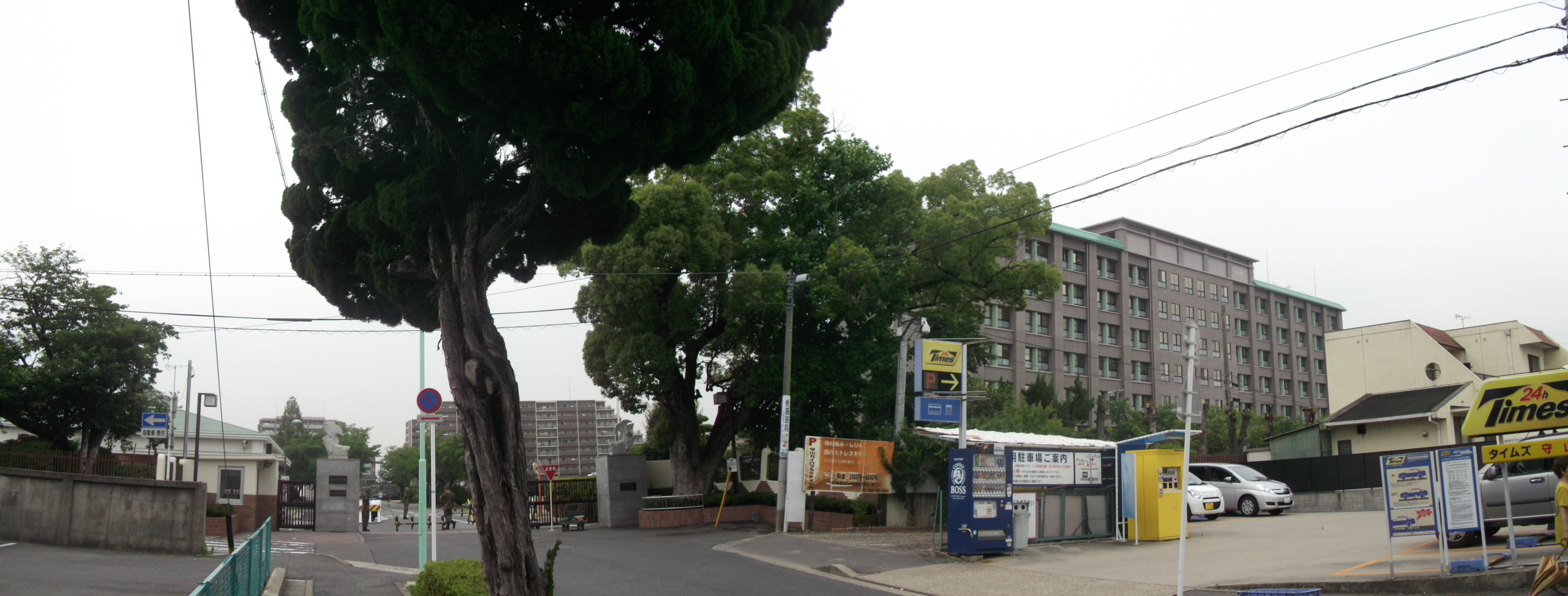 名古屋市守山区の陸上自衛隊守山駐屯地を南側より撮影。カメラのパノラマ合成機能により、現地において合成